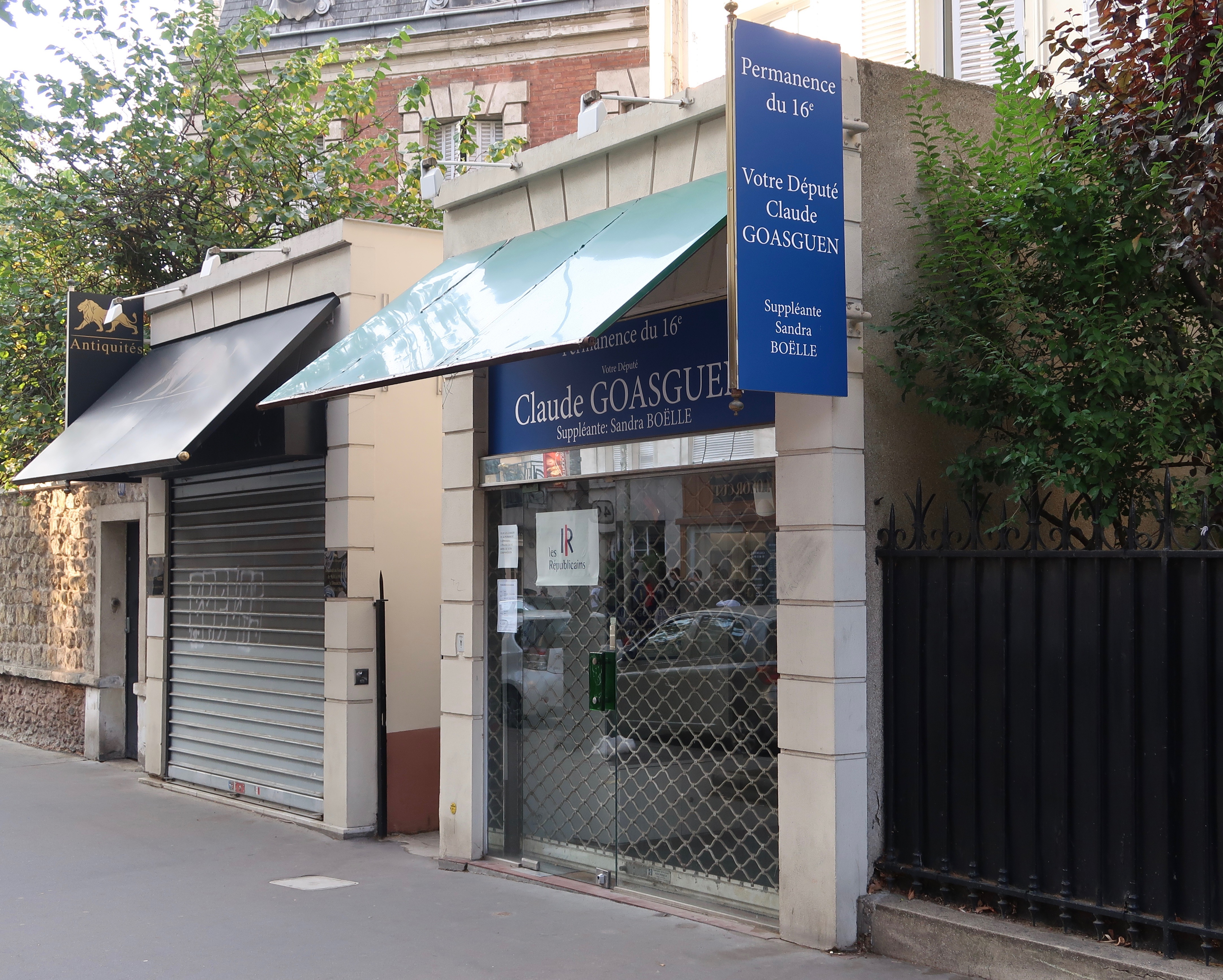 Permanence parlementaire du député de la 14e circonscription de Paris (16e arrondissement) Claude Goasguen, 38 rue Molitor.